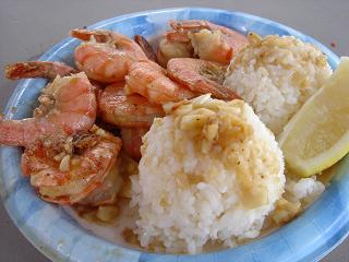 Hawaiian plate lunch